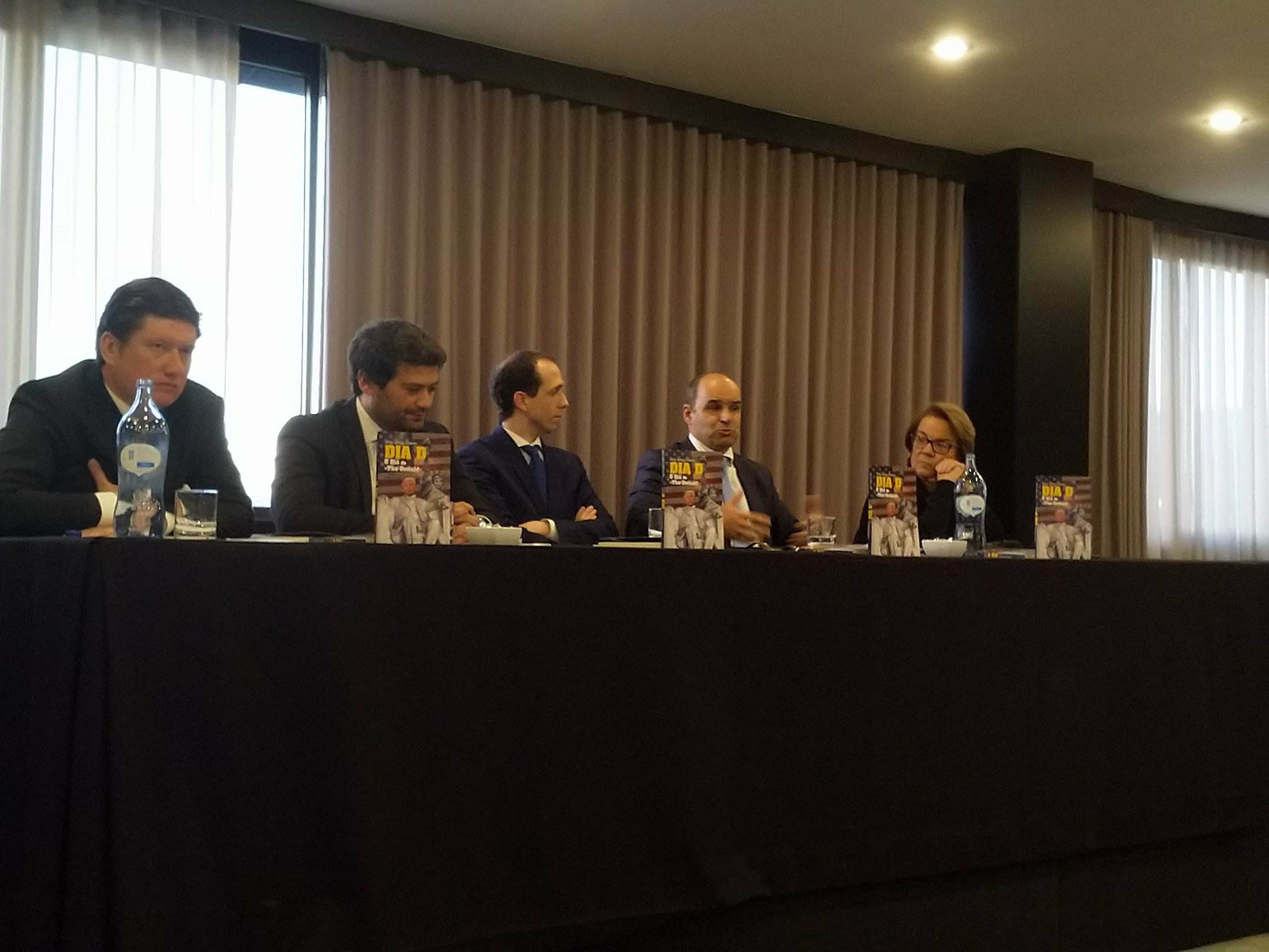 Lançamento do Livro de João Lemos Esteves - Dia D, o dia de “The Donald”, sobre a eleição do Presidente Americano Donald Trump.